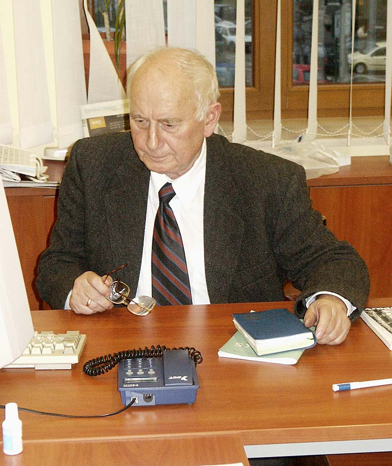 Mecenas Marian Podgóreczny, grudzień 2004 r.